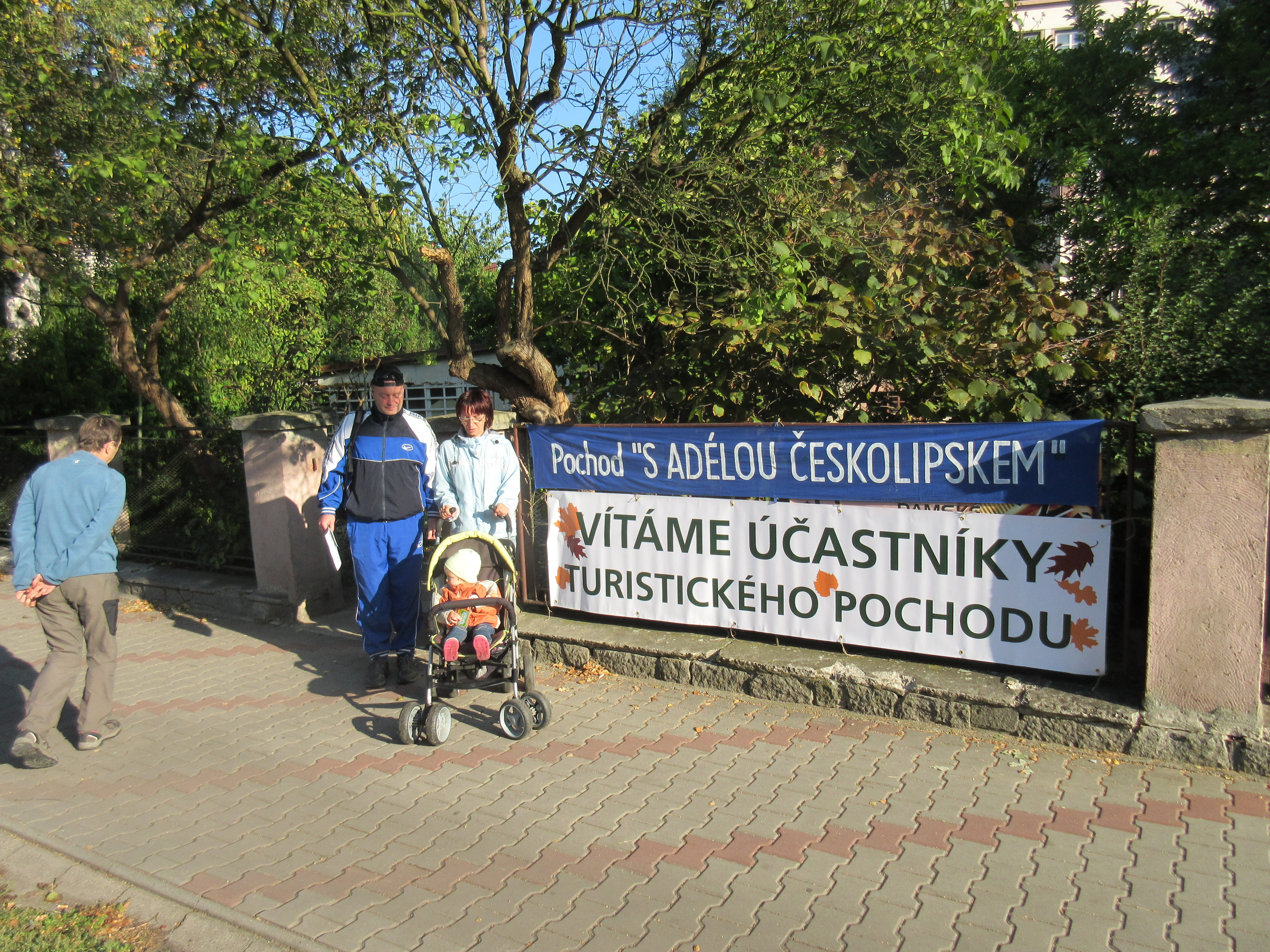 Turistická akce KČT Česká Lípa